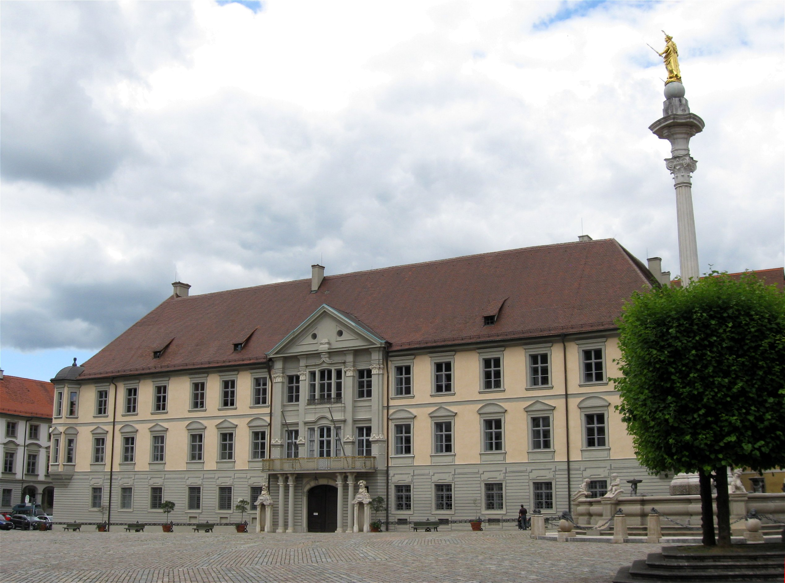 Residenzplatz 1; ehem. Fürstbischöfliche Residenz, jetzt Landratsamt, an die Südseite des Domes angeschlossene große barocke Dreiflügelanlage, West- und Ostflügel von Giovanni Giacomo Engl erbaut, dreigeschossig mit rustiziertem Erdgeschoss, aufwendigen Risaliten, polygonalen Eckerkern und Wachthäuschen seitlich vor den Portalen, bezeichnet mit dem Jahr 1702, Südflügel 1725/27 von Gabriel de Gabrieli, Prunk-Treppenhaus und Spiegelsaal 1767/68 von Maurizio Pedetti, Neugestaltung der Südfassade 1791 durch Pedetti; mit Ausstattung. D-1-76-123-210